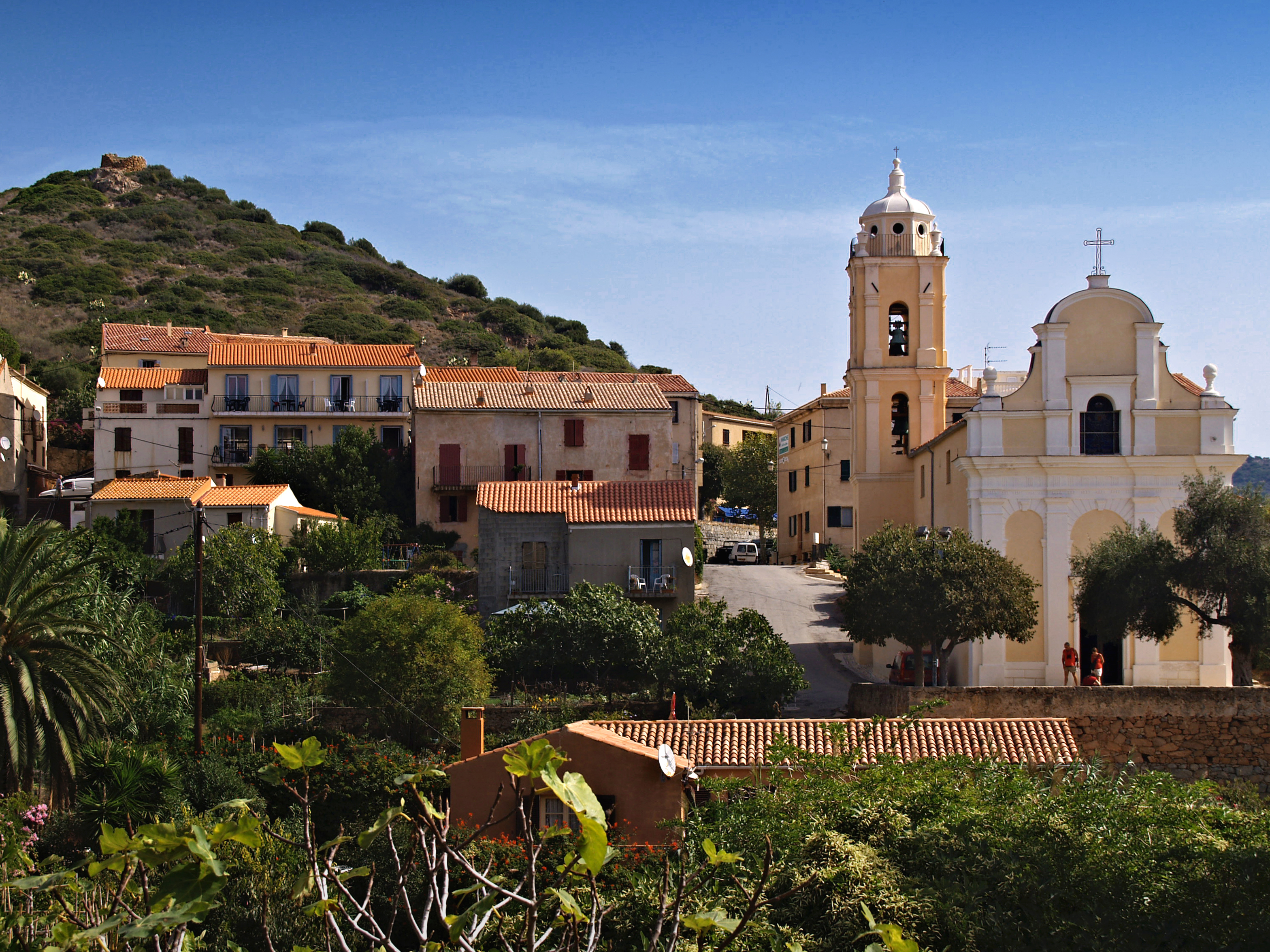 Cargèse (Corse) - Le quartier au sud-ouest du village avec l'église Latine. Au sommet de la colline, un moulin ruiné